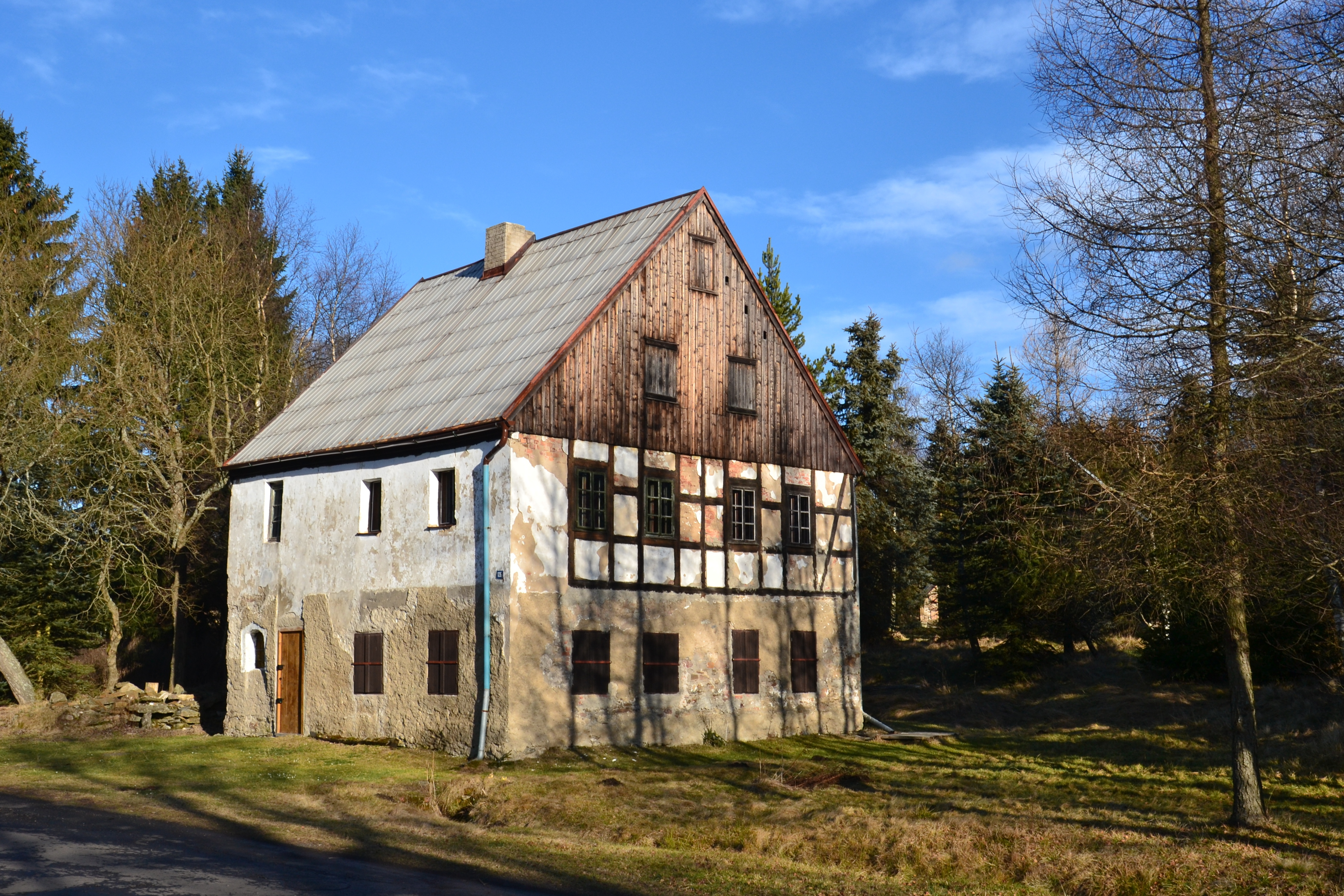 Jediný dochovaný dům